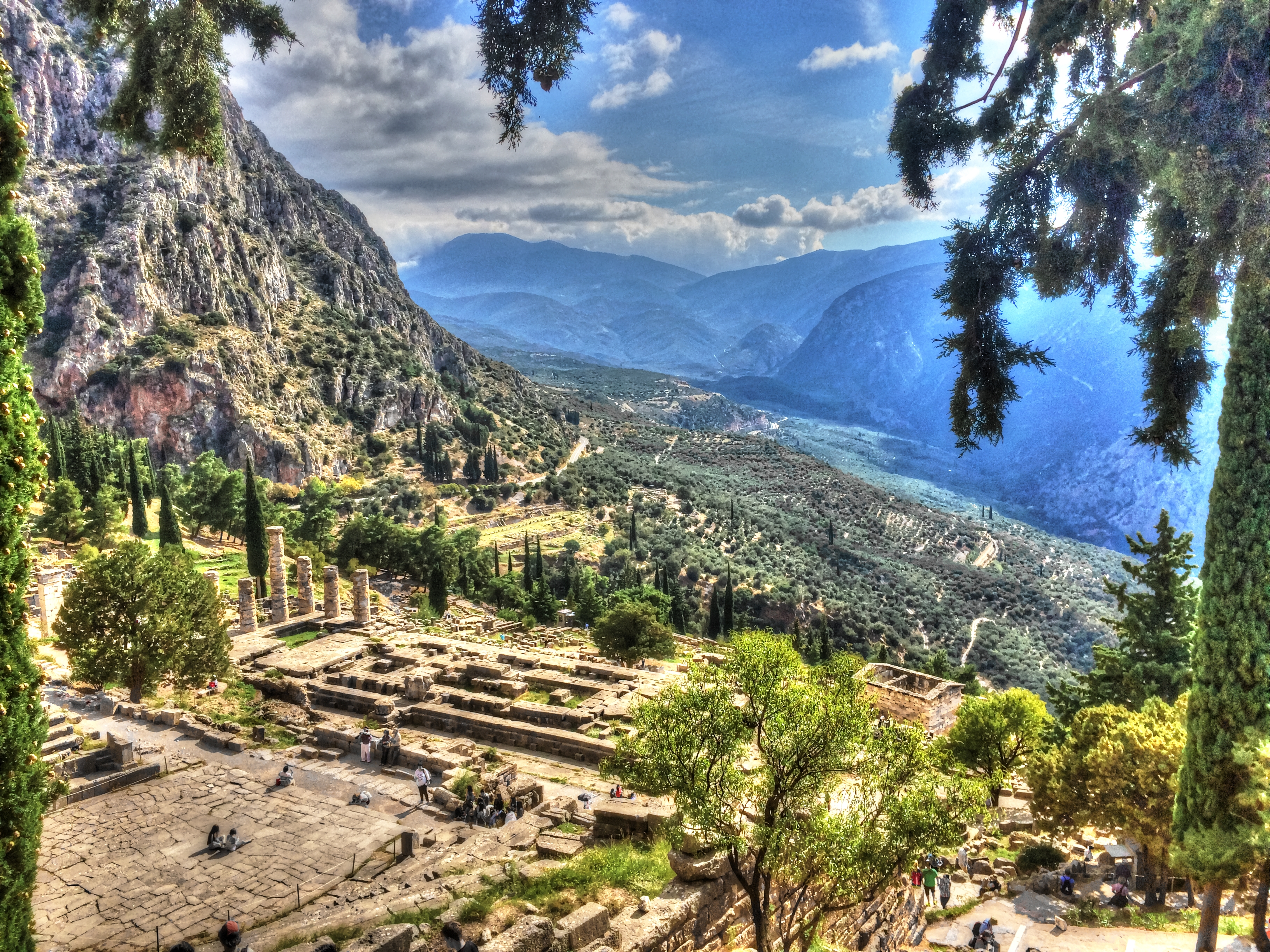 Delfi